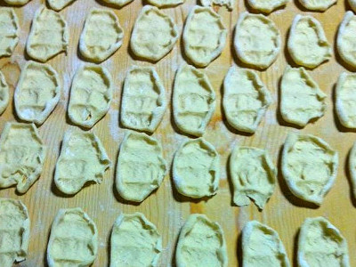 Parmatieddi di Teggiano